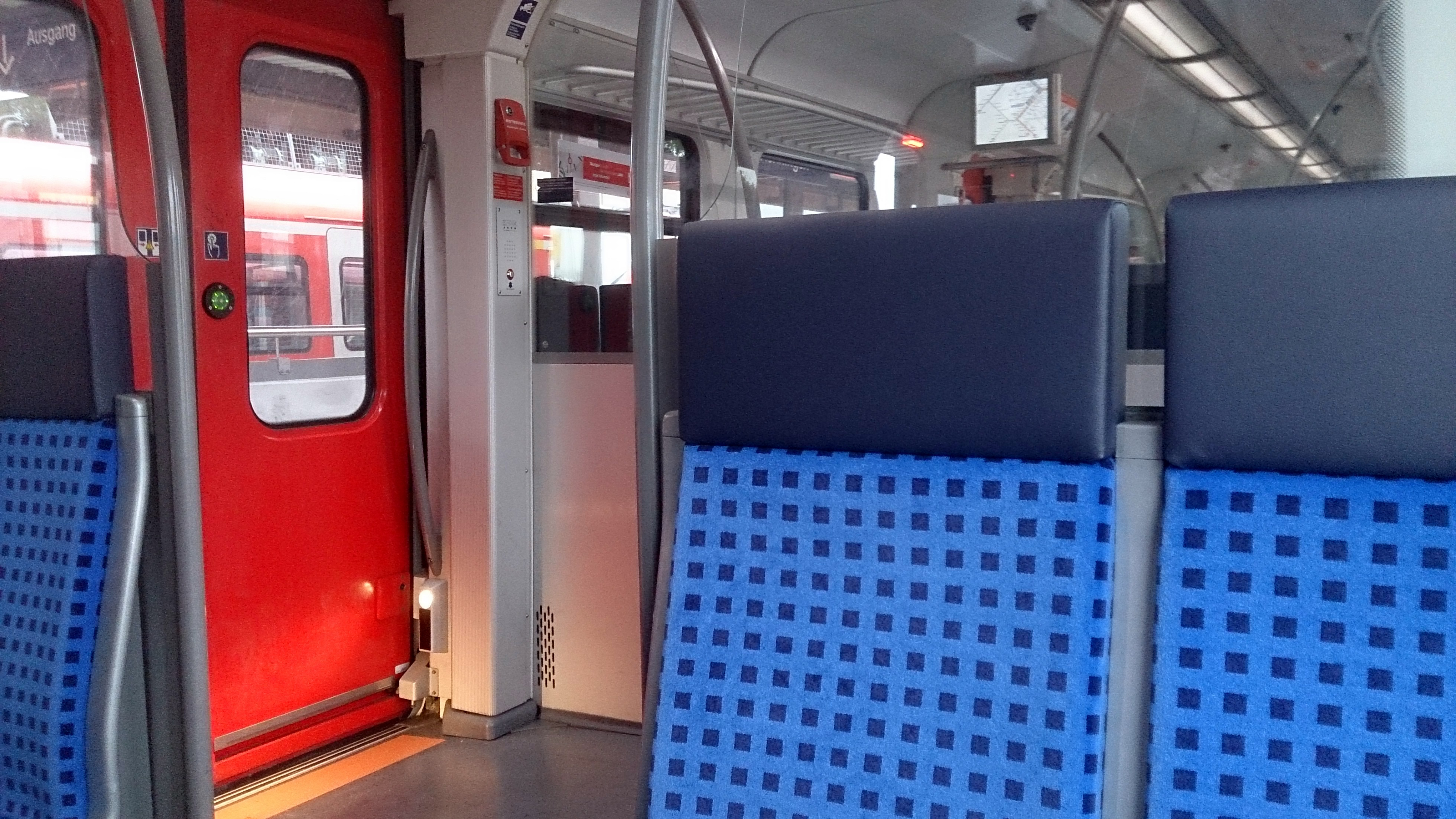 Innenansicht einer modernisierten BR 423 in Stuttgart.